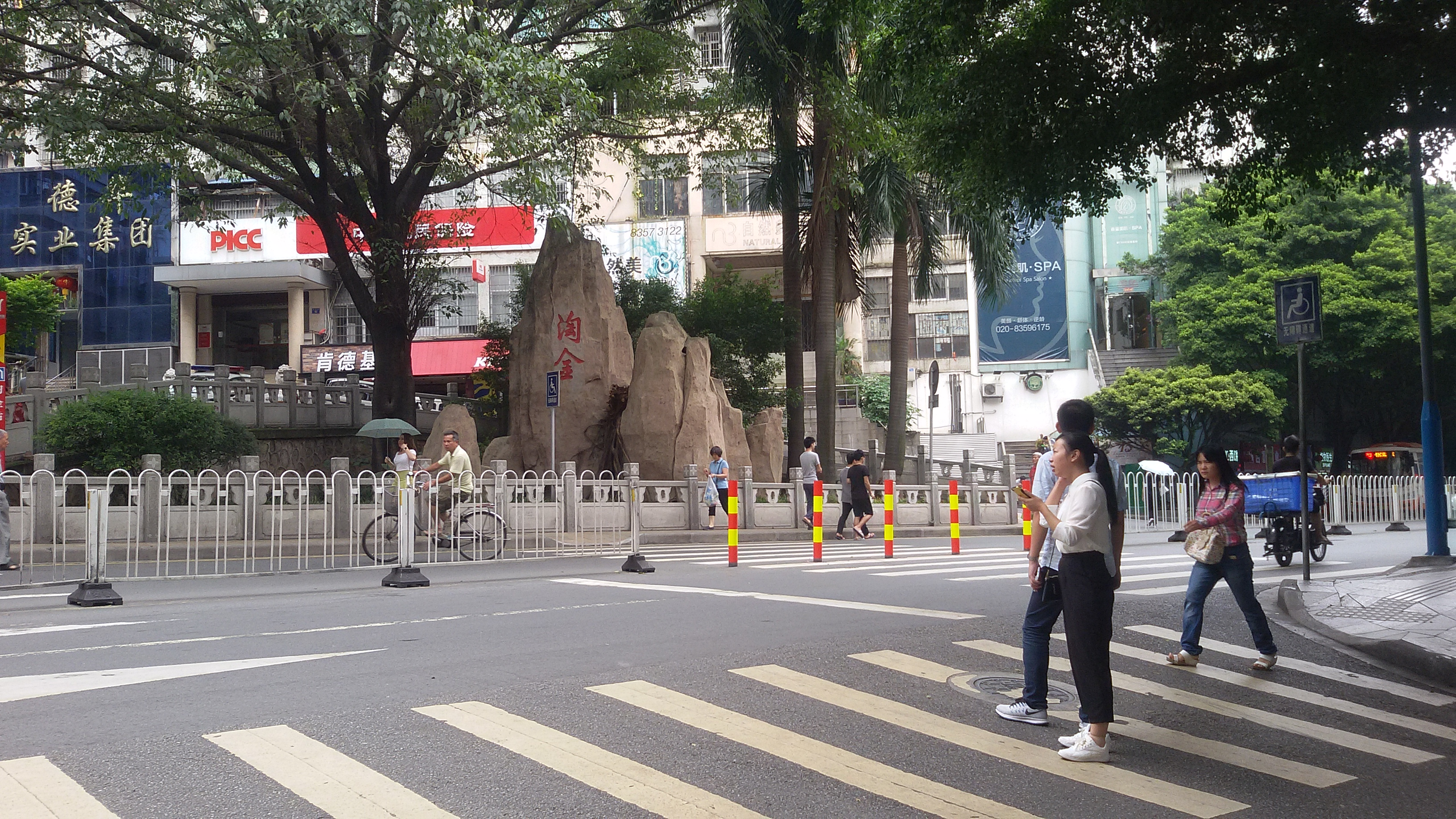 粵語: 淘金坑